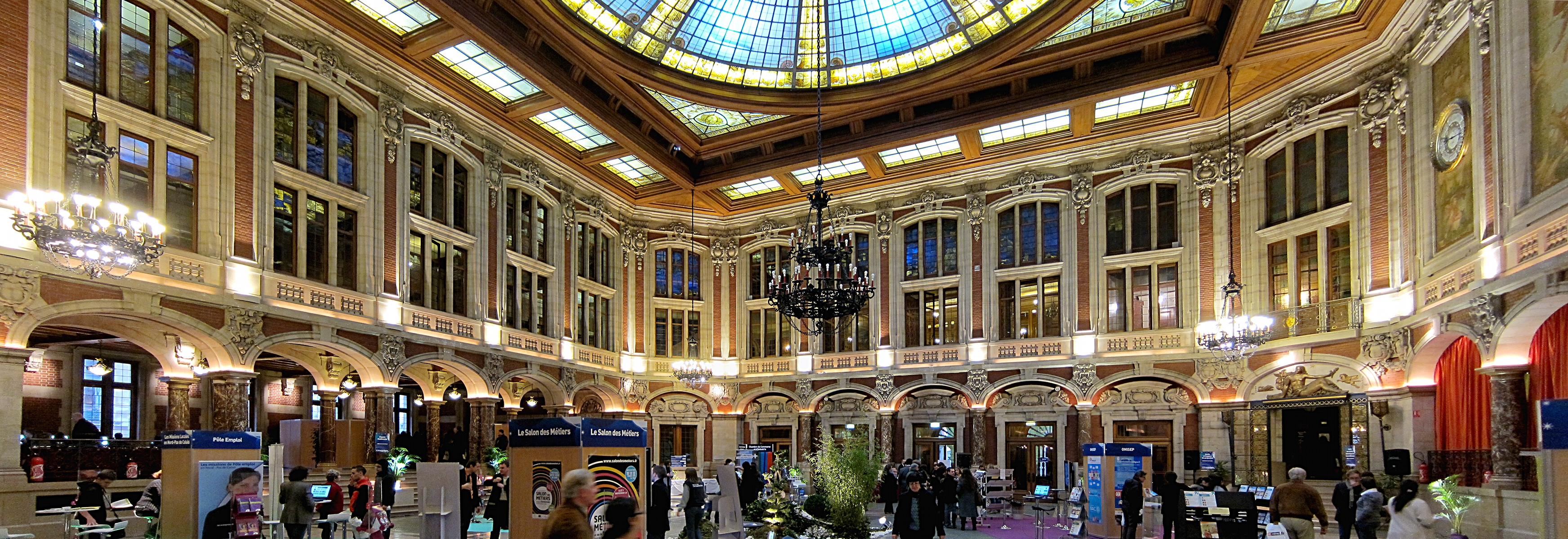 Le grand hall de la chambre de commerce de Lille (Nord).